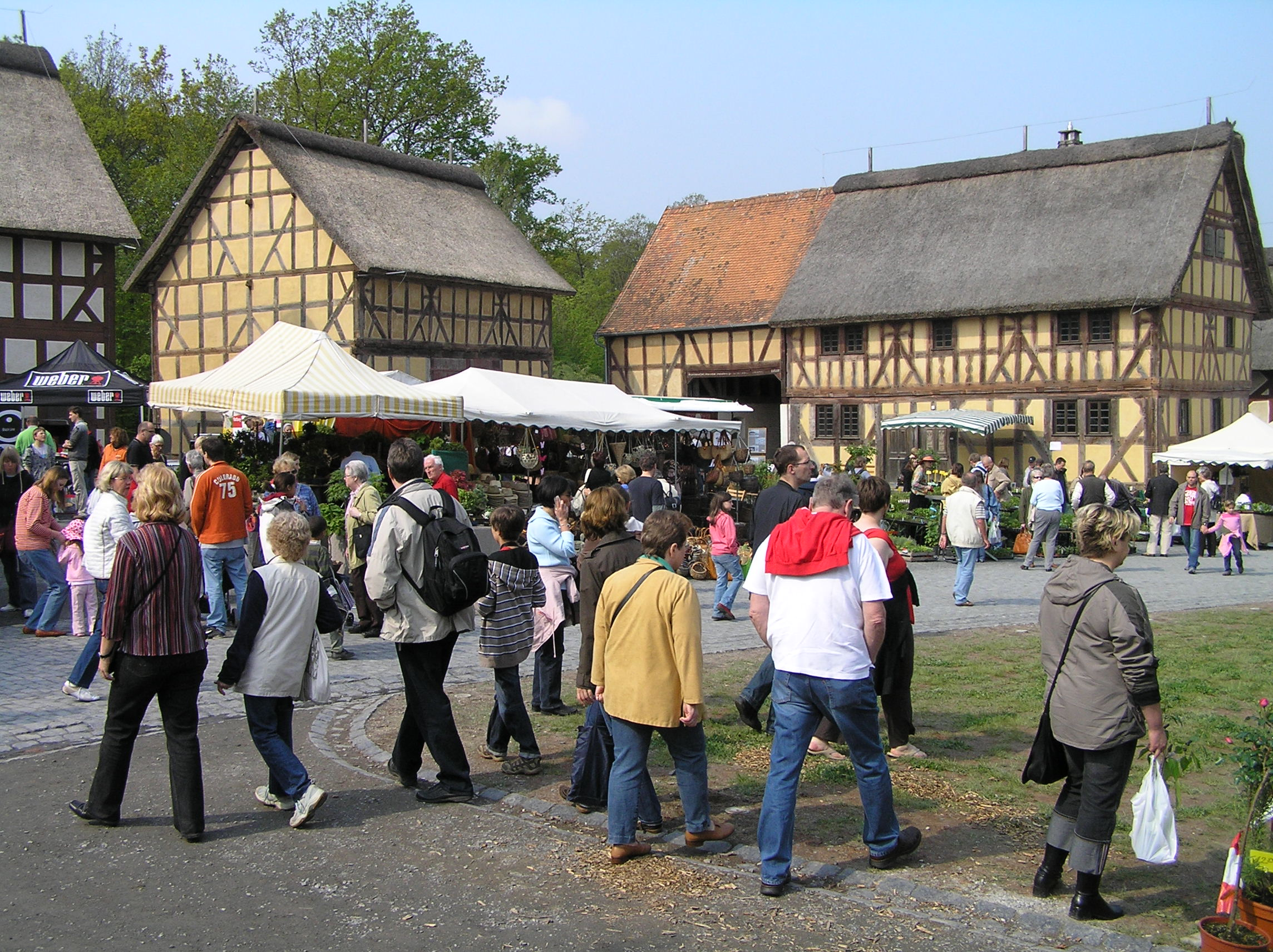 Pflanzenmarkt im Hessenpark, Neu-Anspach, Deutschland